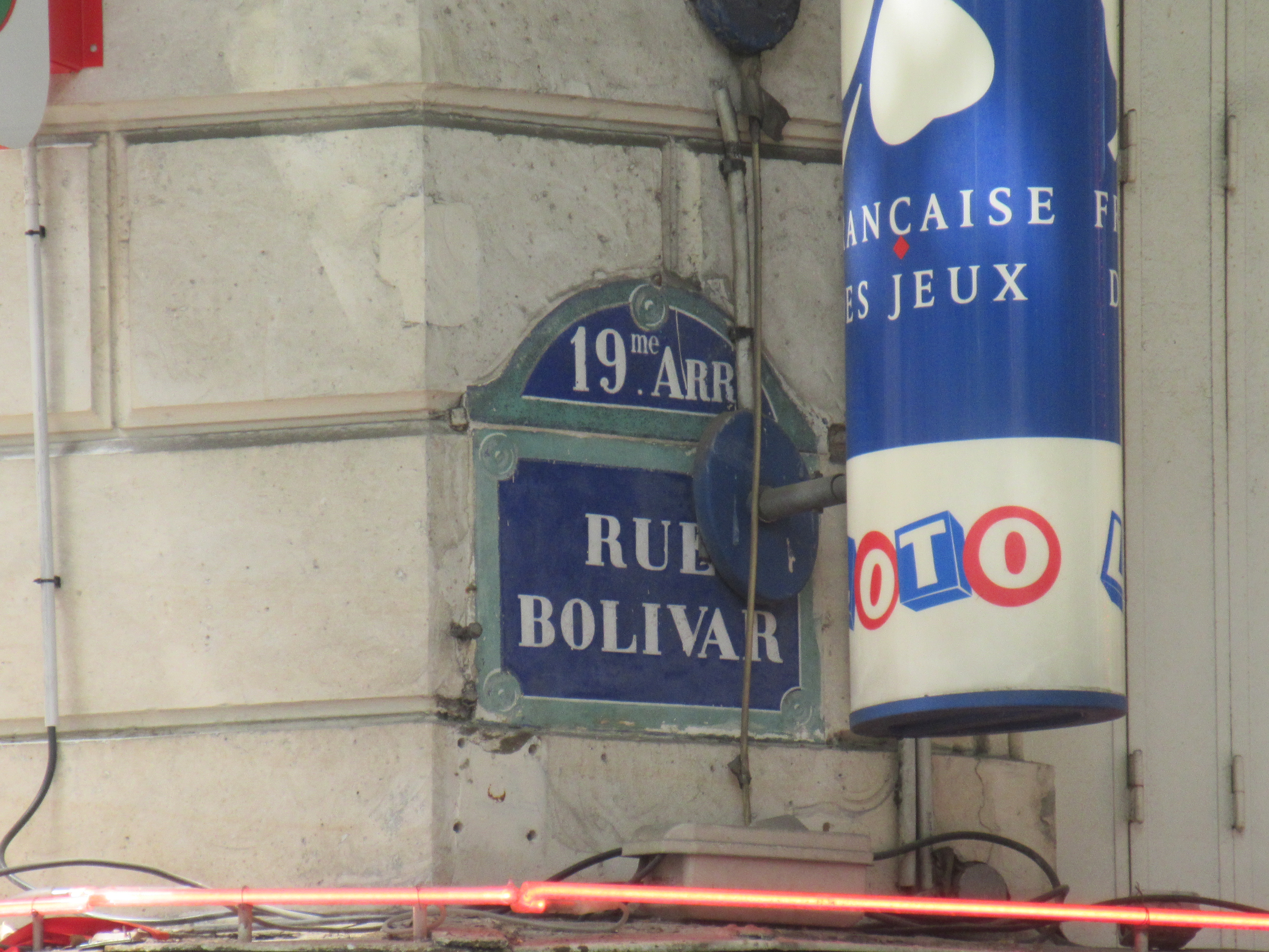 Plaque de la rue Bolivar, Paris